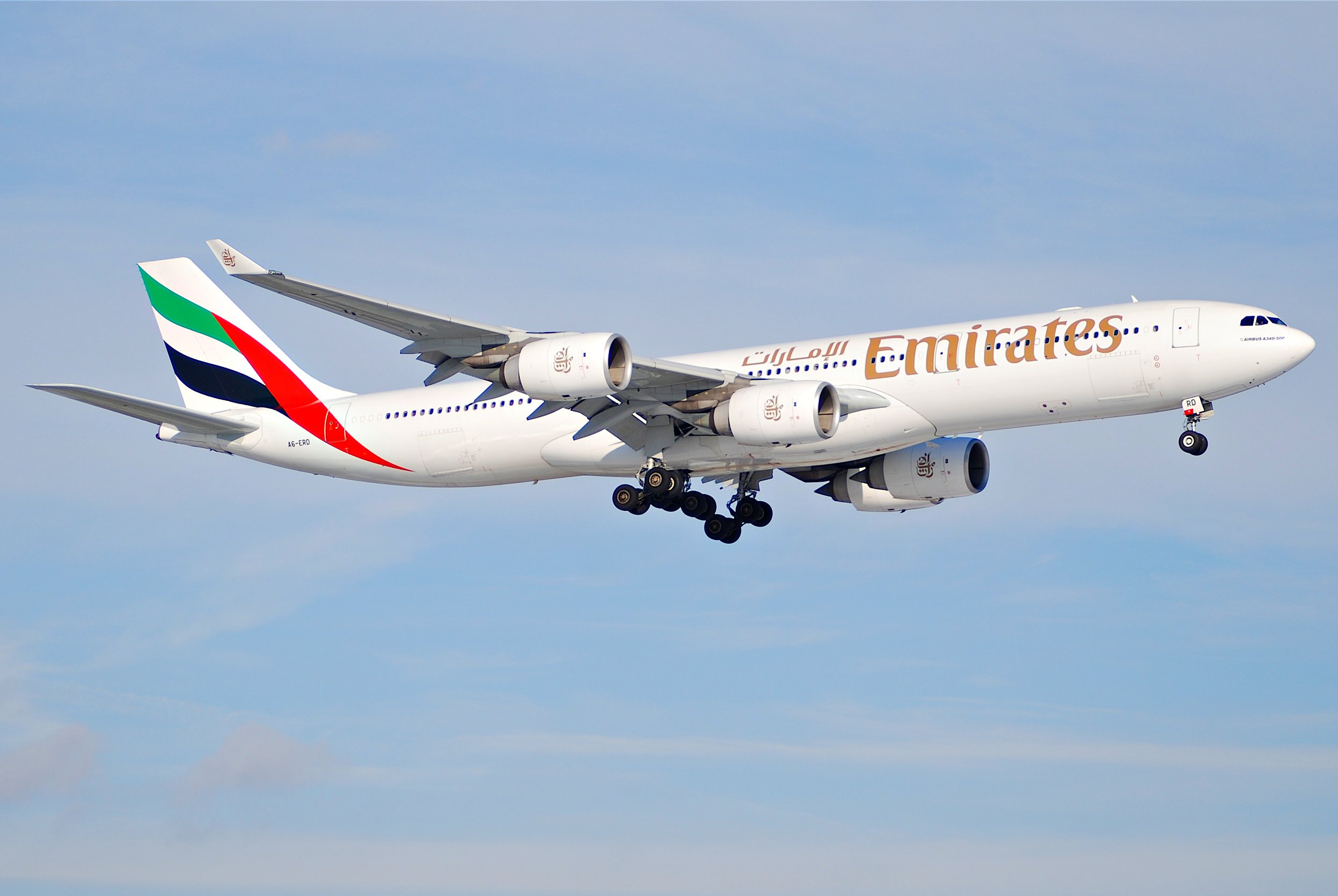 Emirates Airbus A340-500; A6-ERD@ZRH;28.01.2007/449em